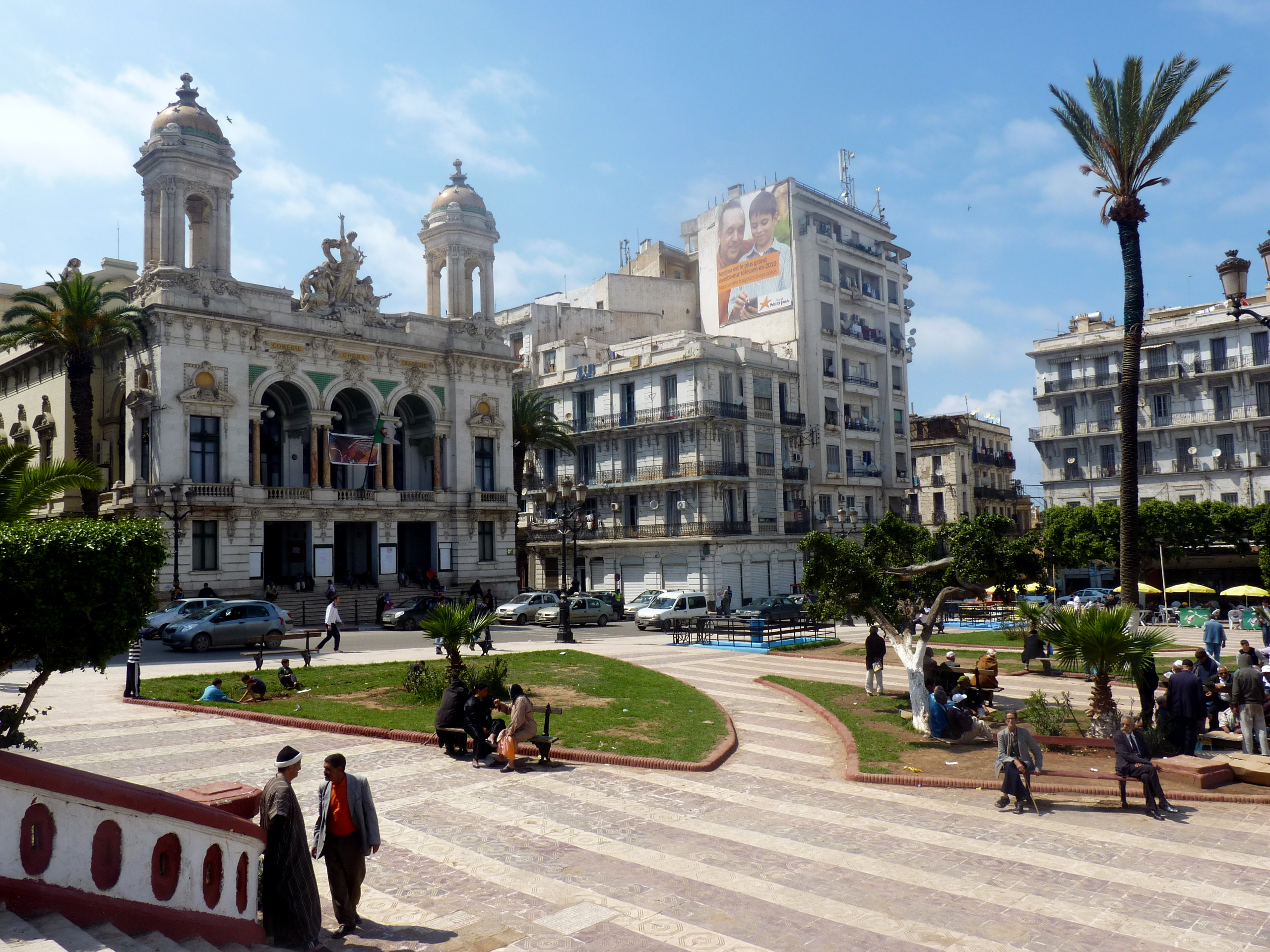 Oran parque, Algérie. Mai 2011.